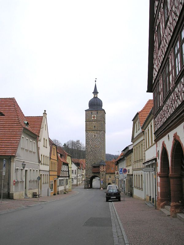 Ebern (Unterfranken). Blick vom Rathaus zum Grauturm. Eigene Aufnahme, April 2006